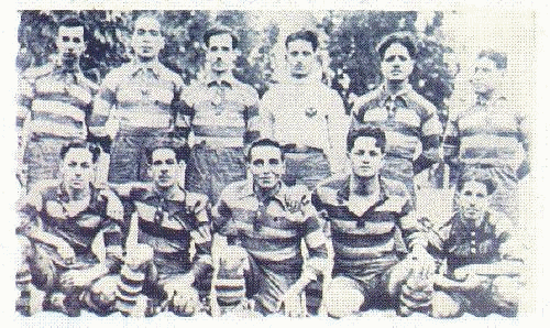 équipe du Mouloudia d'Alger saison 1926-1927